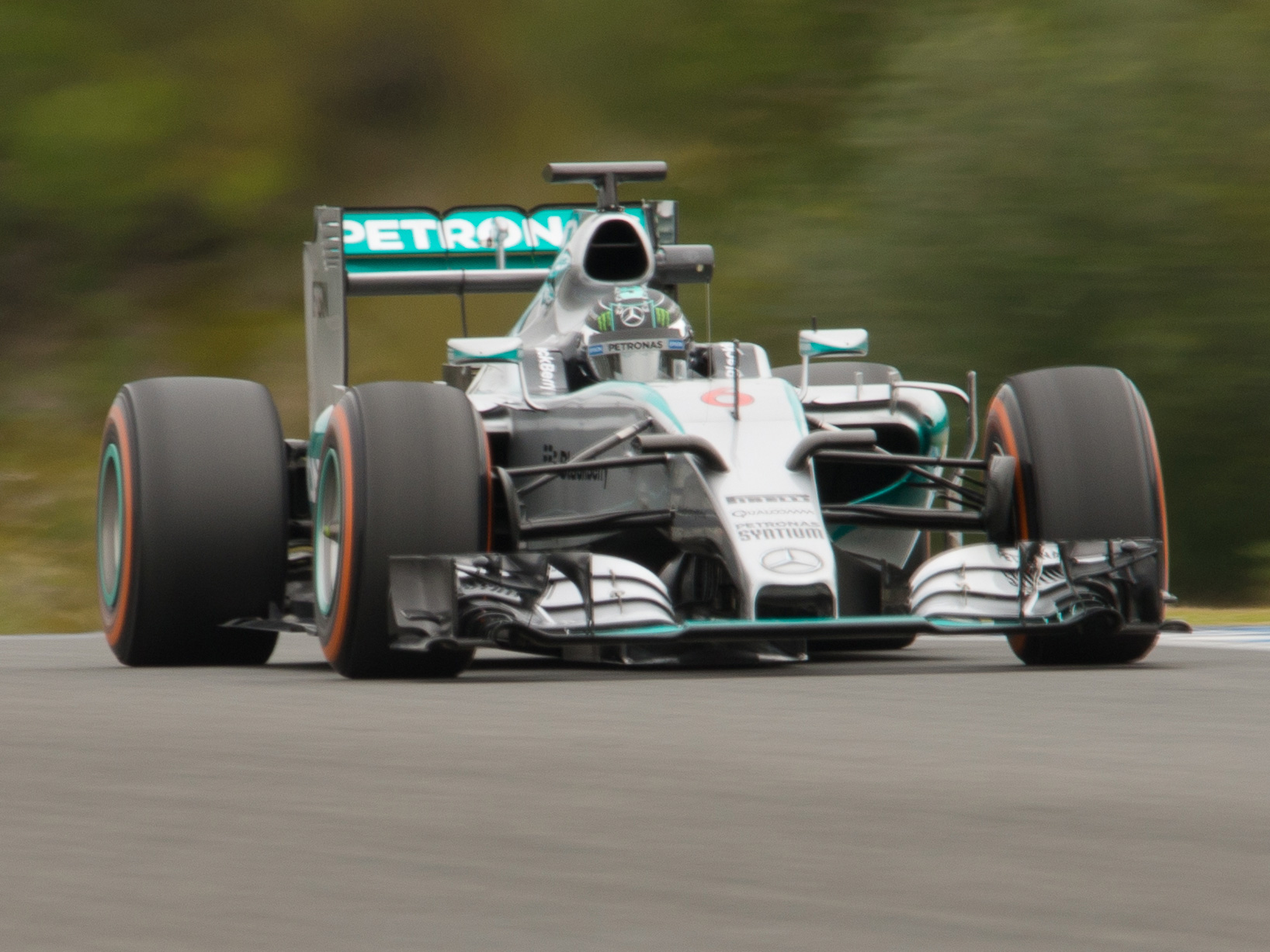 Nico Rosberg im F1 W06 bei ersten Testfahrten in Jerez